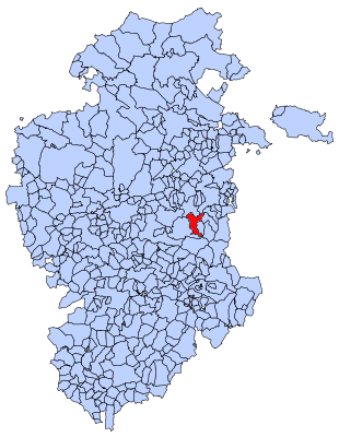 Rábanos en Burgos